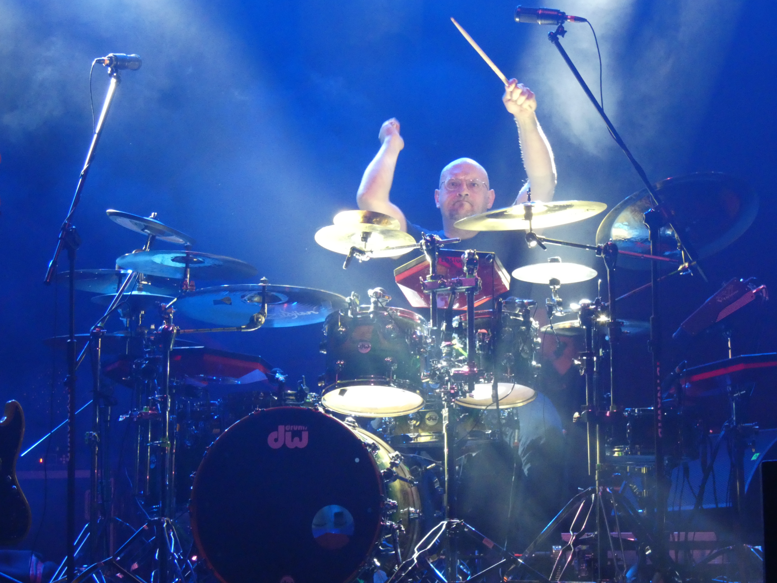 Tomasz Łosowski, Nowa Dęba 2019-06-16